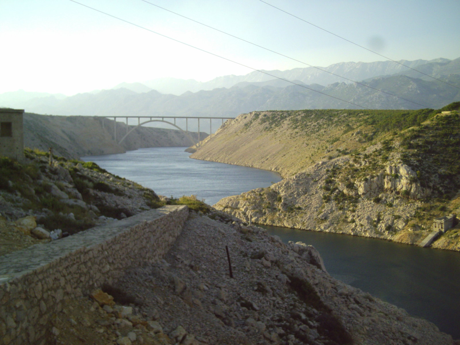 Novigradsko ždrilo